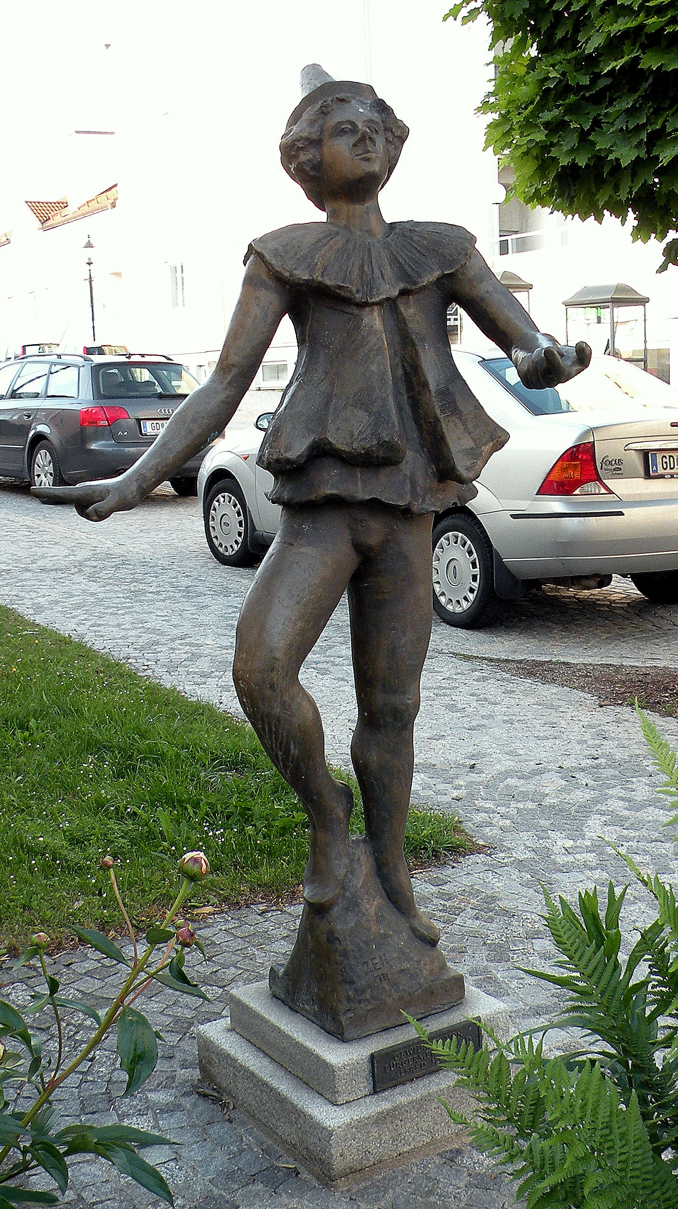 Harlekinstatue vor dem Theater unterm Giebel in Heidenreichstein